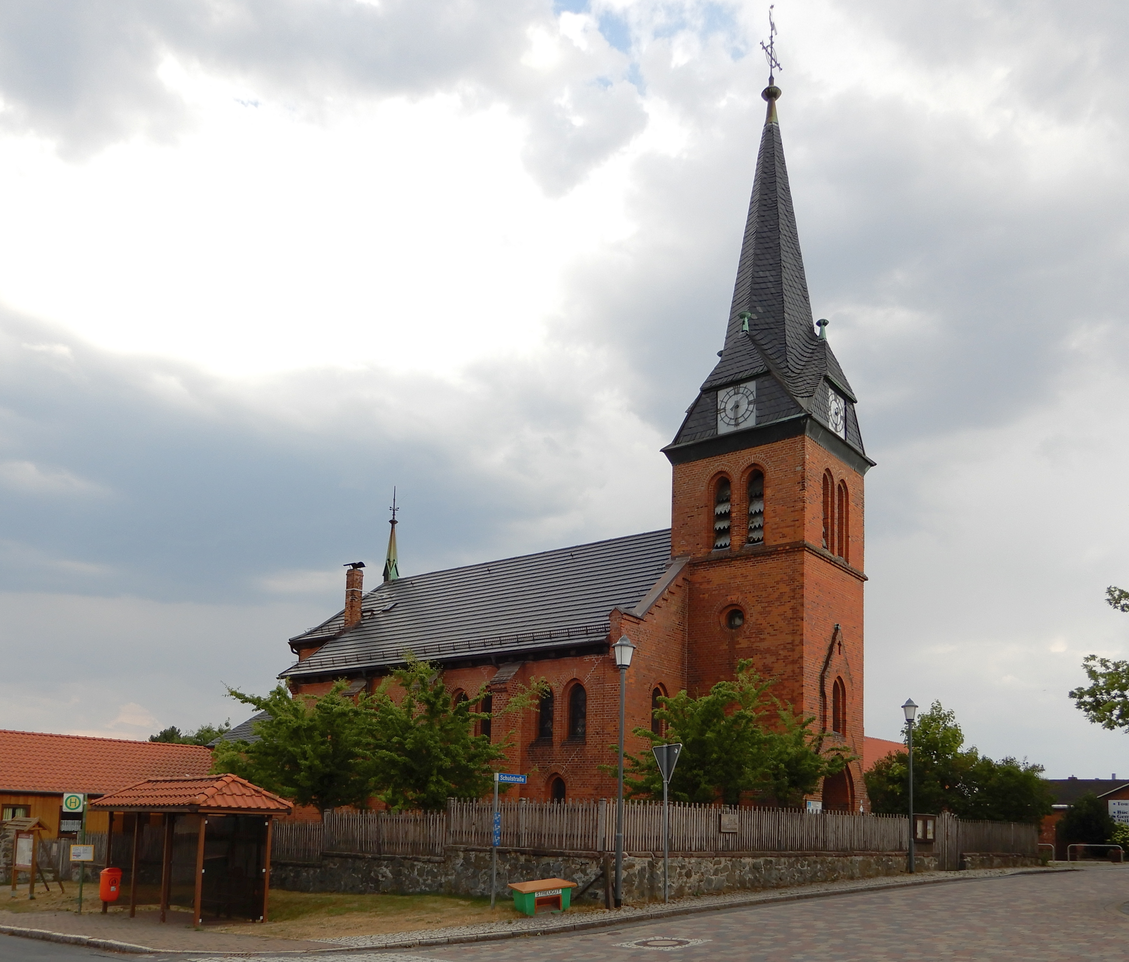 Kirche St. Petrus und Paulus